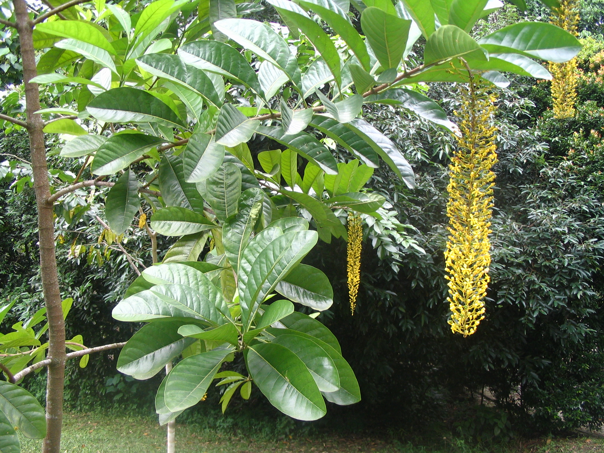 Lophanthera lactescens - feuilles - planté au Forest Research Institute Malaysia , Kepong, Selangor